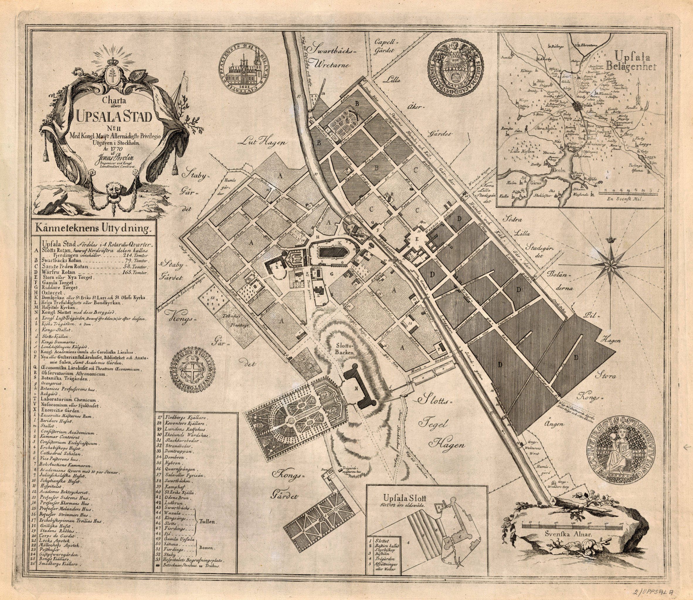 "Charta öfwer Upsala stad no II [Elektronisk resurs] : med Kongl. Maijts allernådigaste privilegio utgifven i Stockholm år 1770". Skannad av Kungliga Biblioteket.